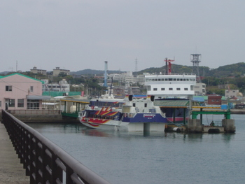 西之表港・ロケット・プリンセスわかさ